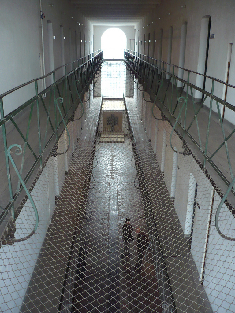 Memorialul victimelor comumismului şi al rezistentei (interior)